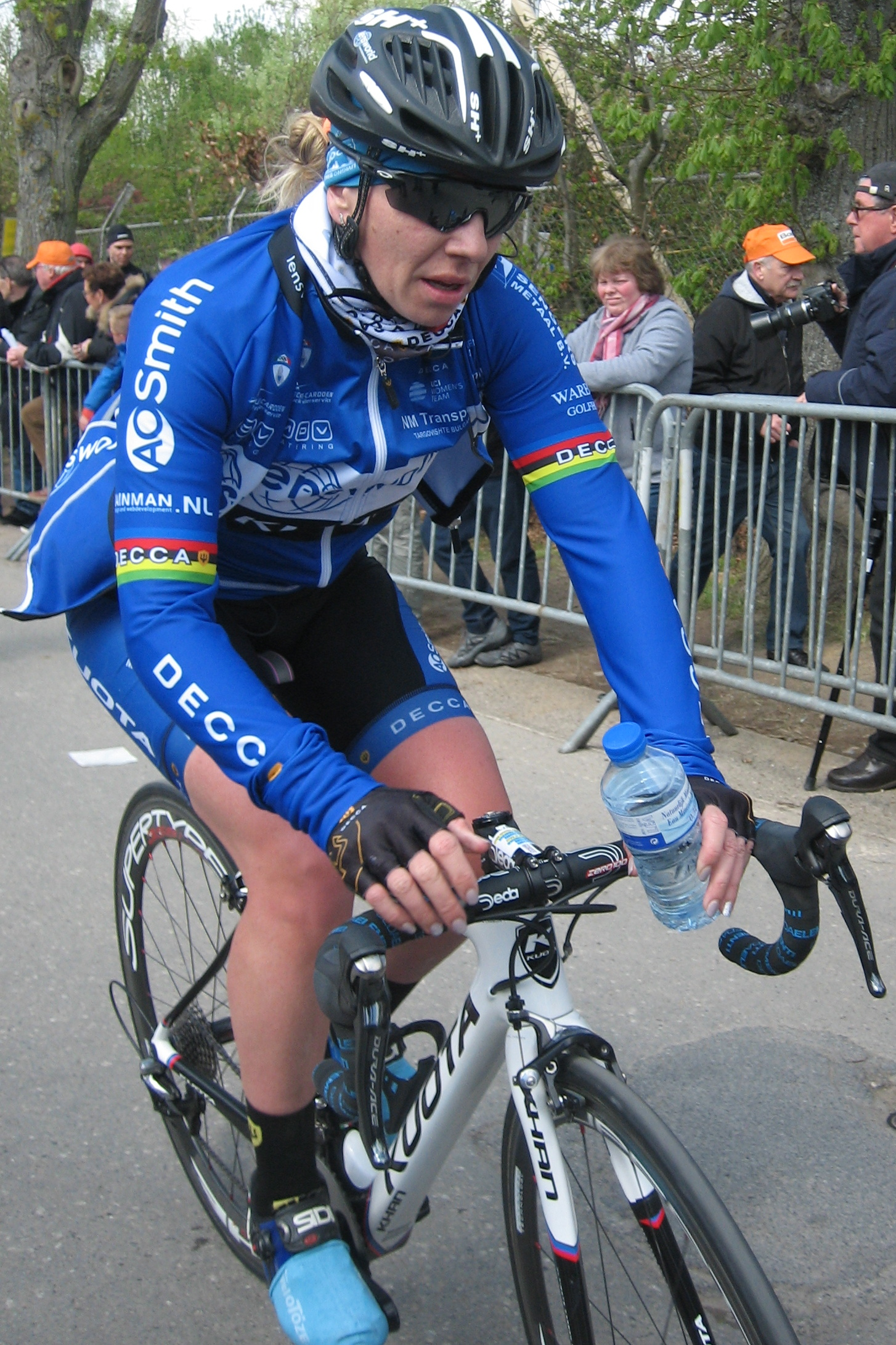 Finish van de Waalse Pijl 2017 in Huy.